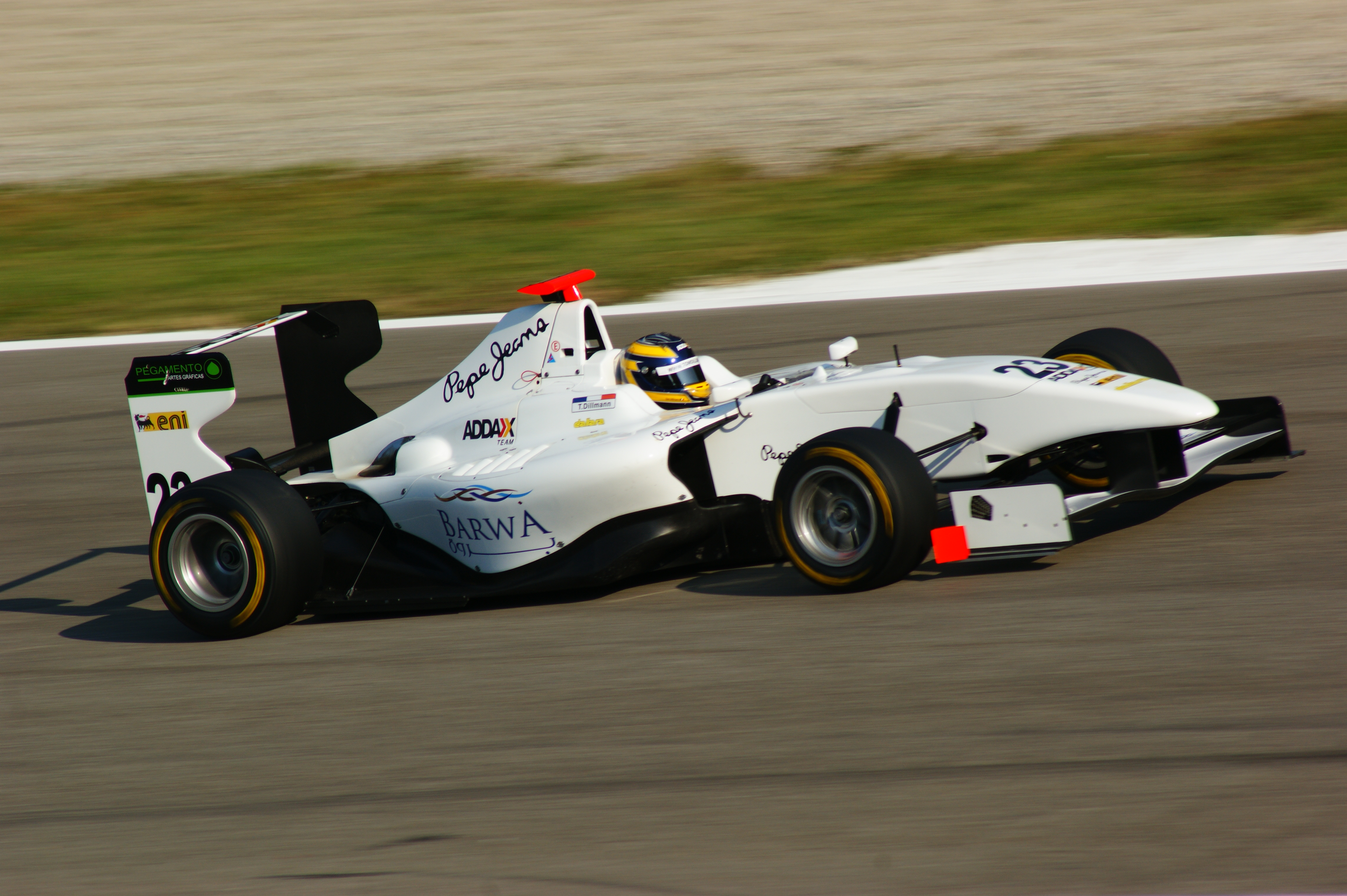 Tom Dillmann alla variante Ascari Monza 2011